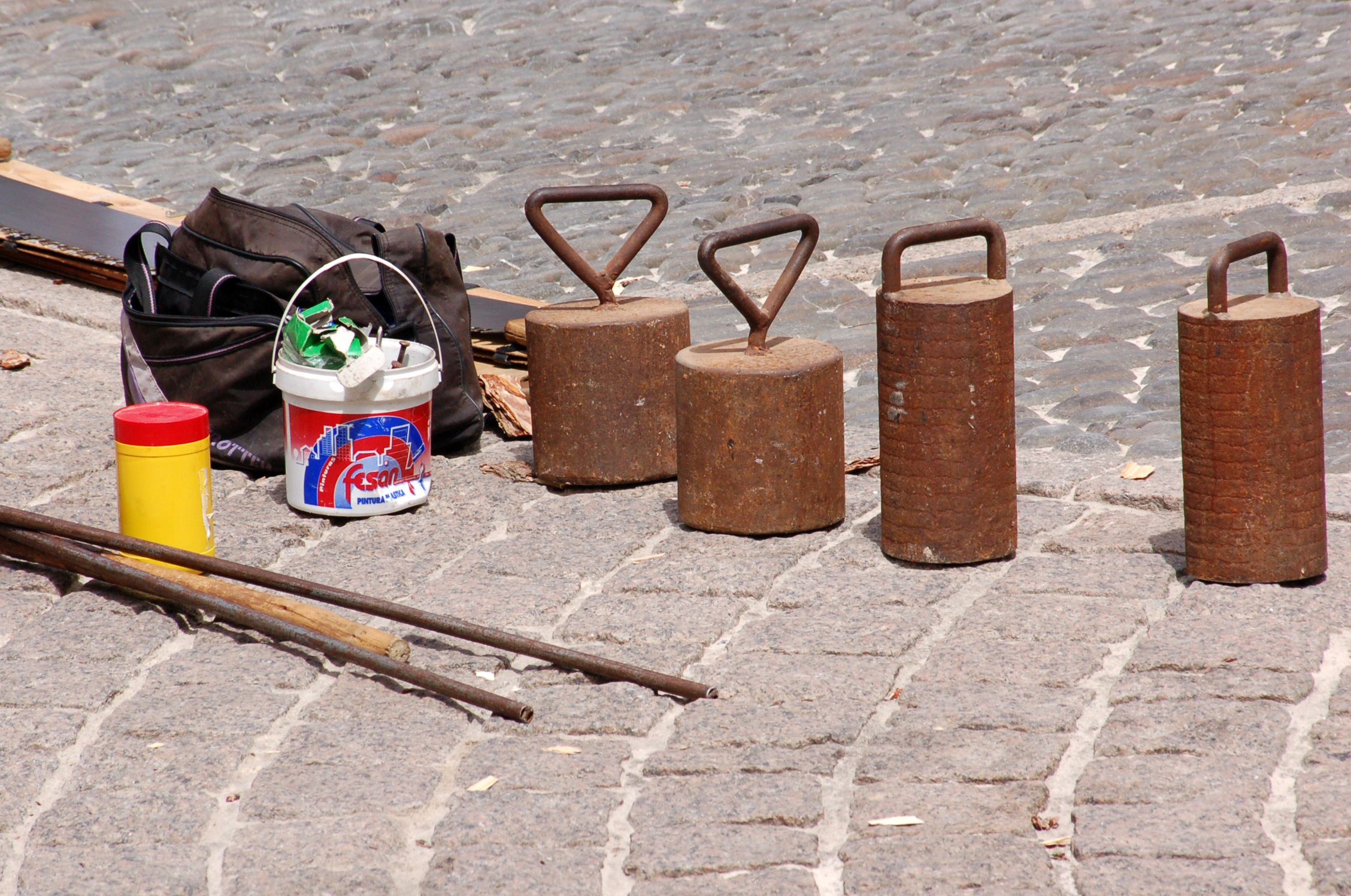 Txingak Gasteizko Foruen plazan.